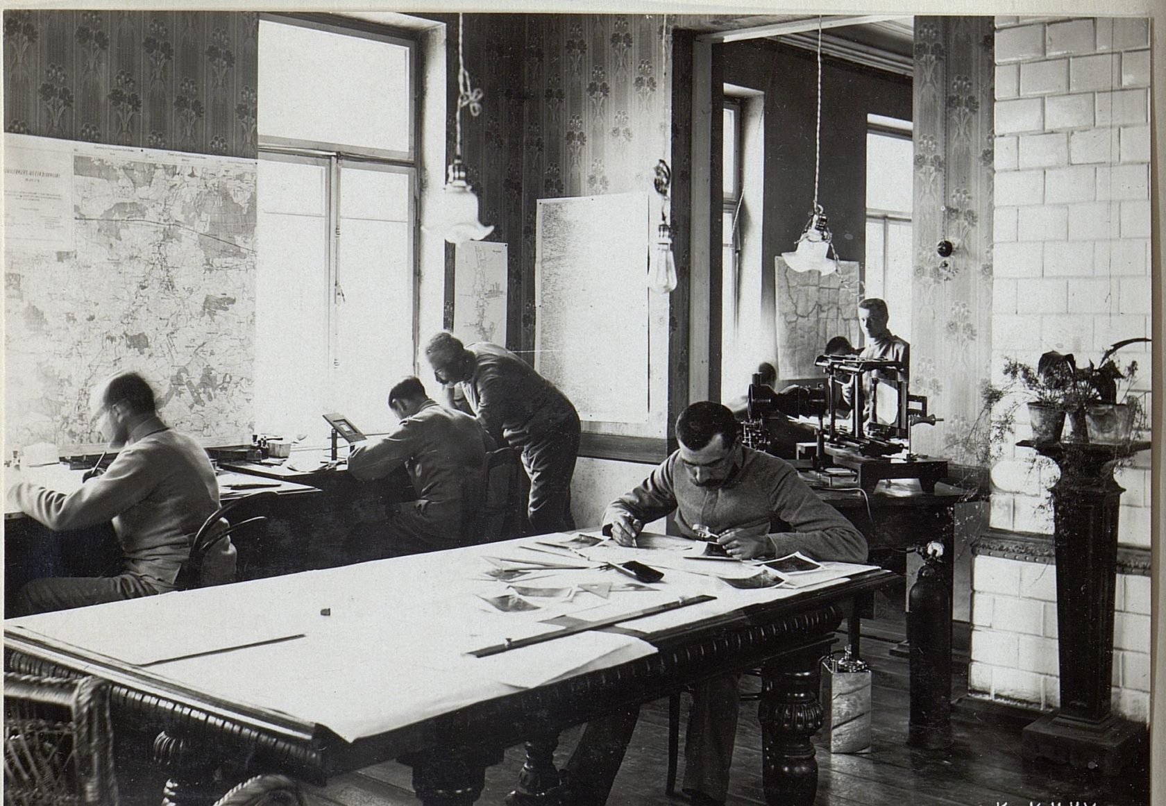 4.Kriegsmappierung: Zeichenzimmer mit Photokartographen Luck.